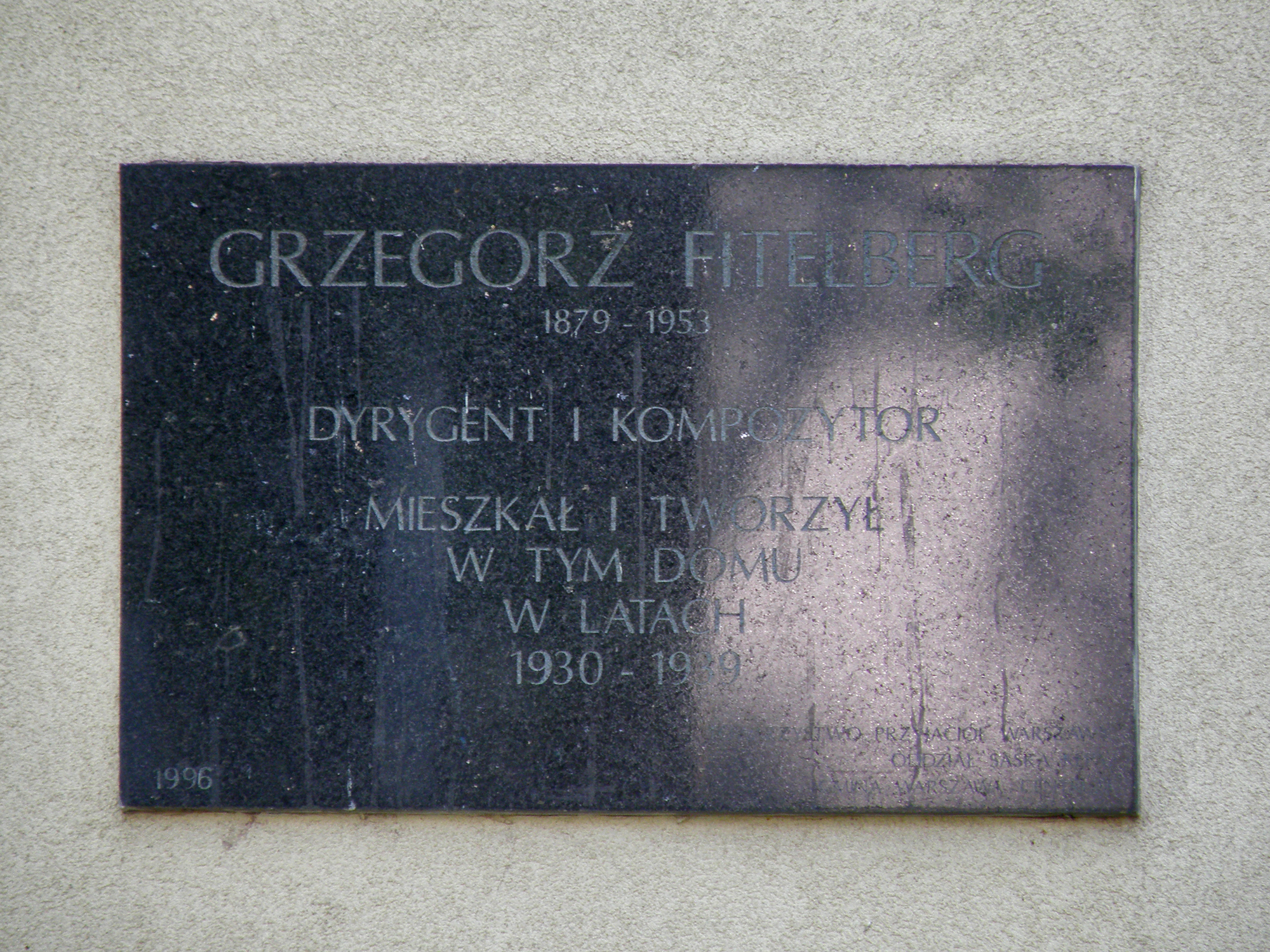 Ulica Elsterska 3 w Warszawie